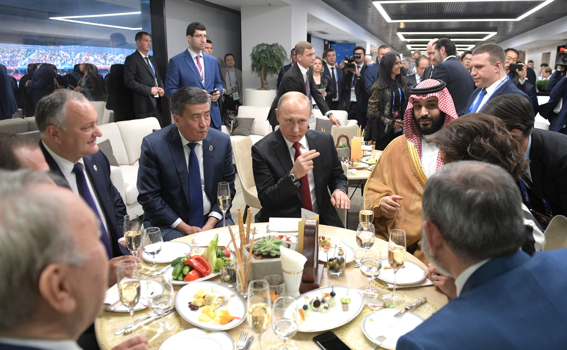 В перерыве матча Президент России Владимир Путин кратко пообщался с иностранными гостями, прибывшими на Чемпионат мира по футболу 2018 года